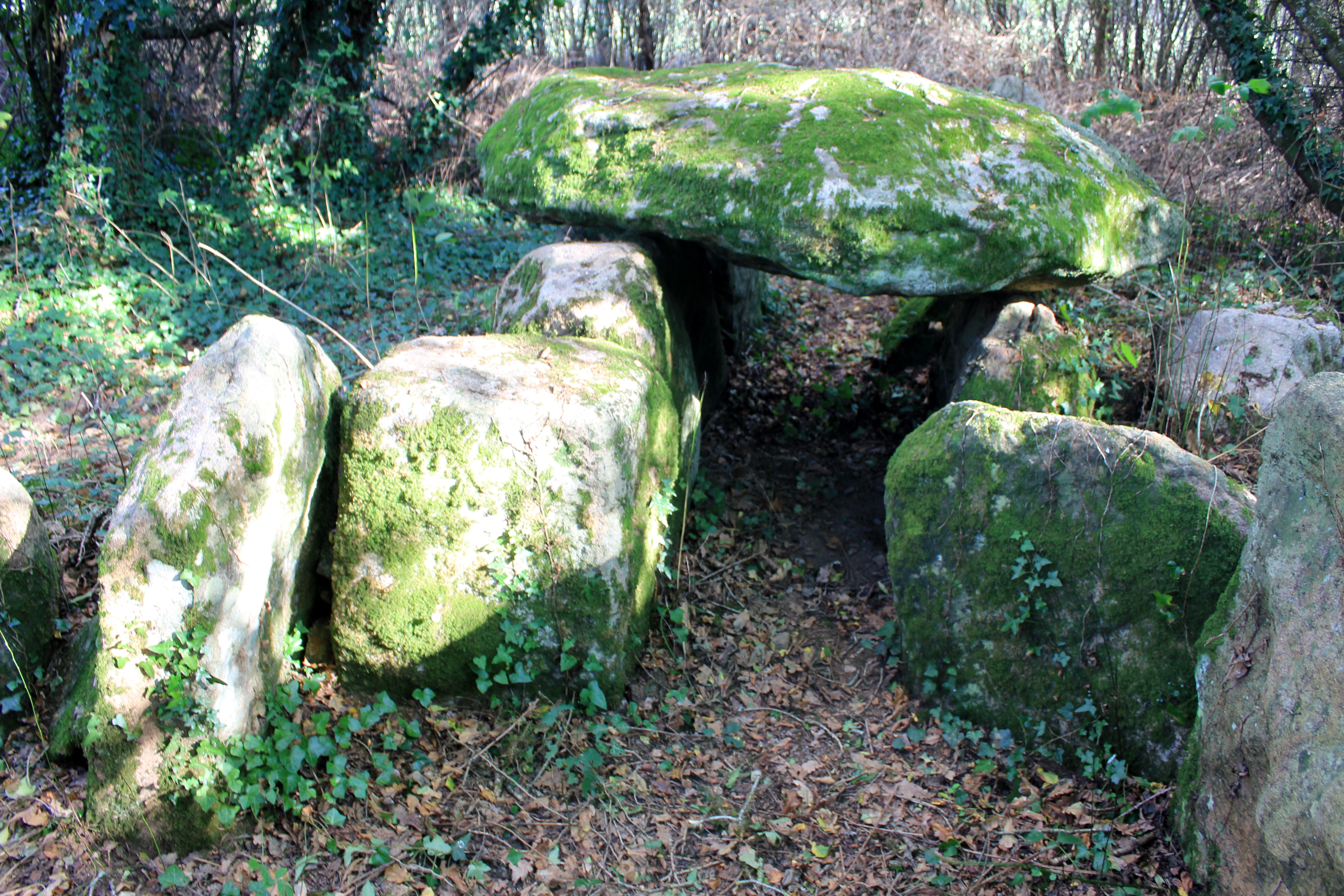 Dolmen à cabinets latéraux de Locqueltas